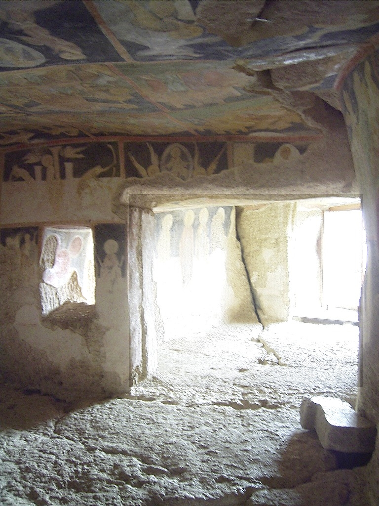 Felskirche Ivanovo Kirche zum Naos hin